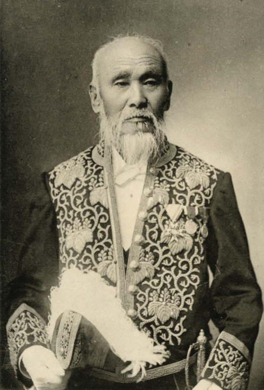 南摩綱紀の肖像写真